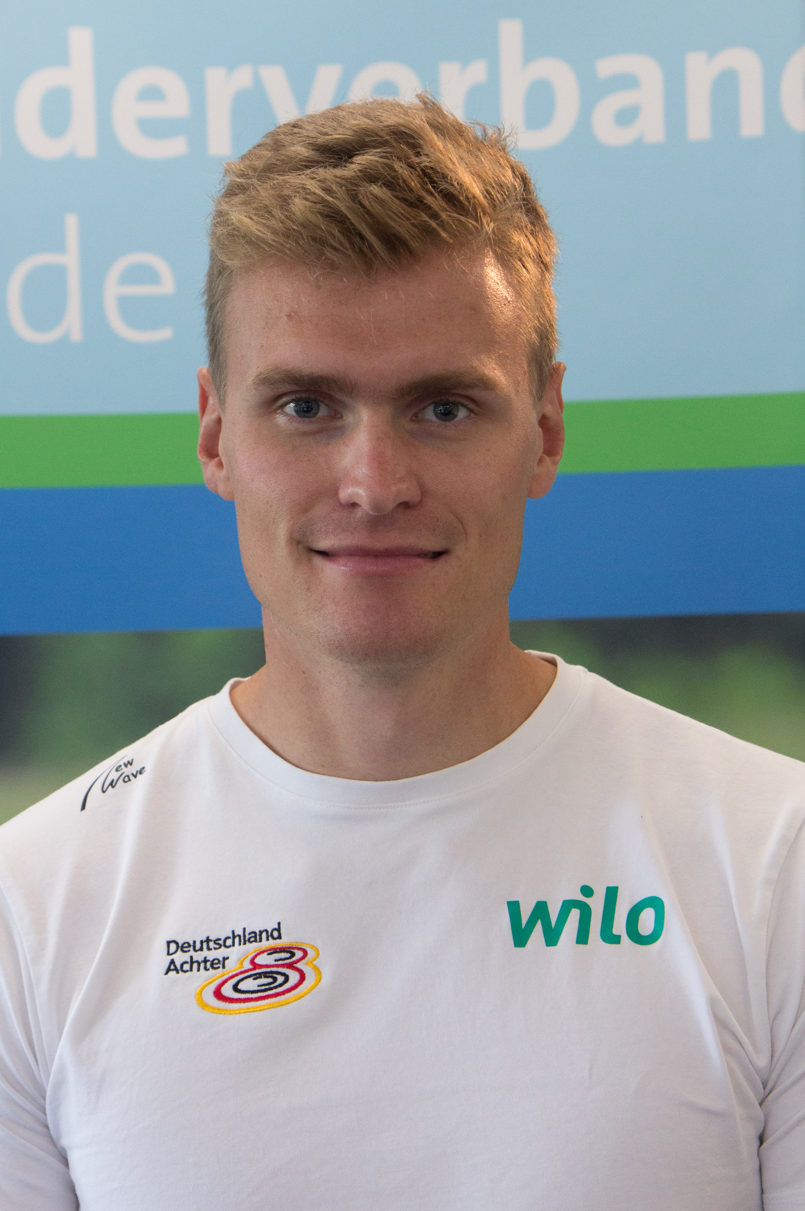 Medientag des Ruderverbandes in der Ruderakademie Ratzeburg am 6. September 2017: Hannes Ocik